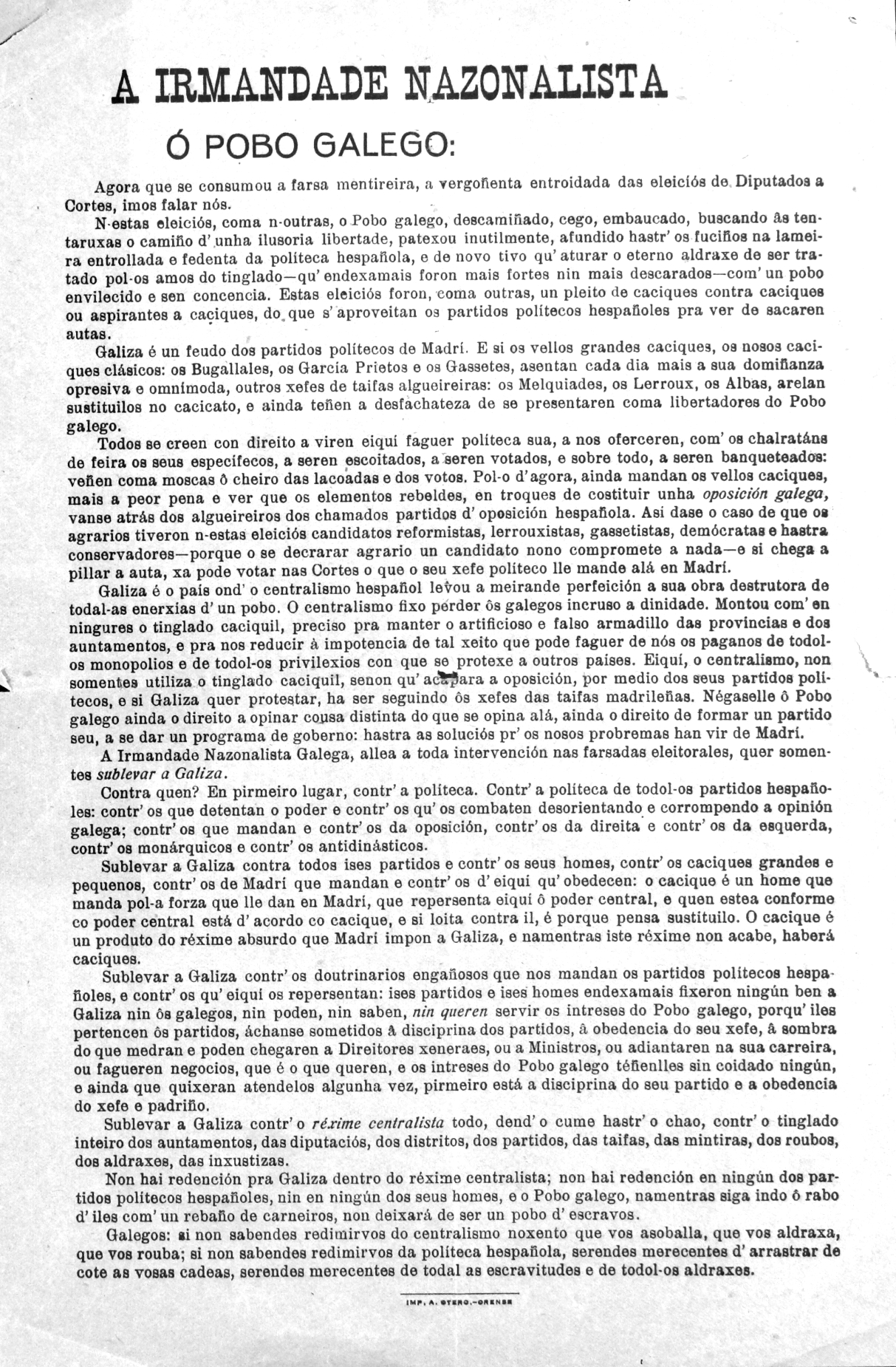 Nota política da Irmandade Nazonalista Galega (1922-1929).